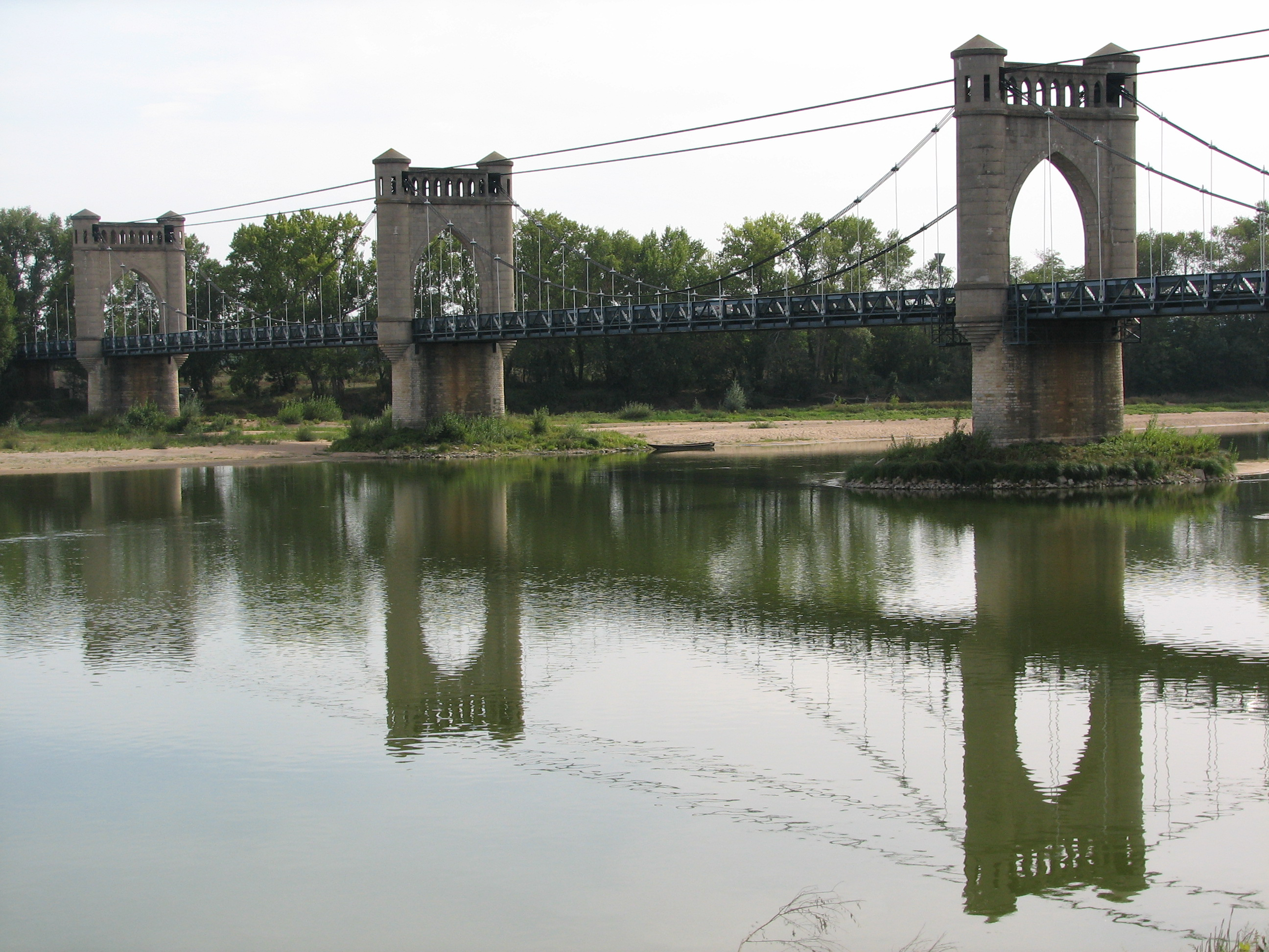 j'ai pris cette photo le 09 septembre 2006. licence libre Creative Commons CC-BY-SA.